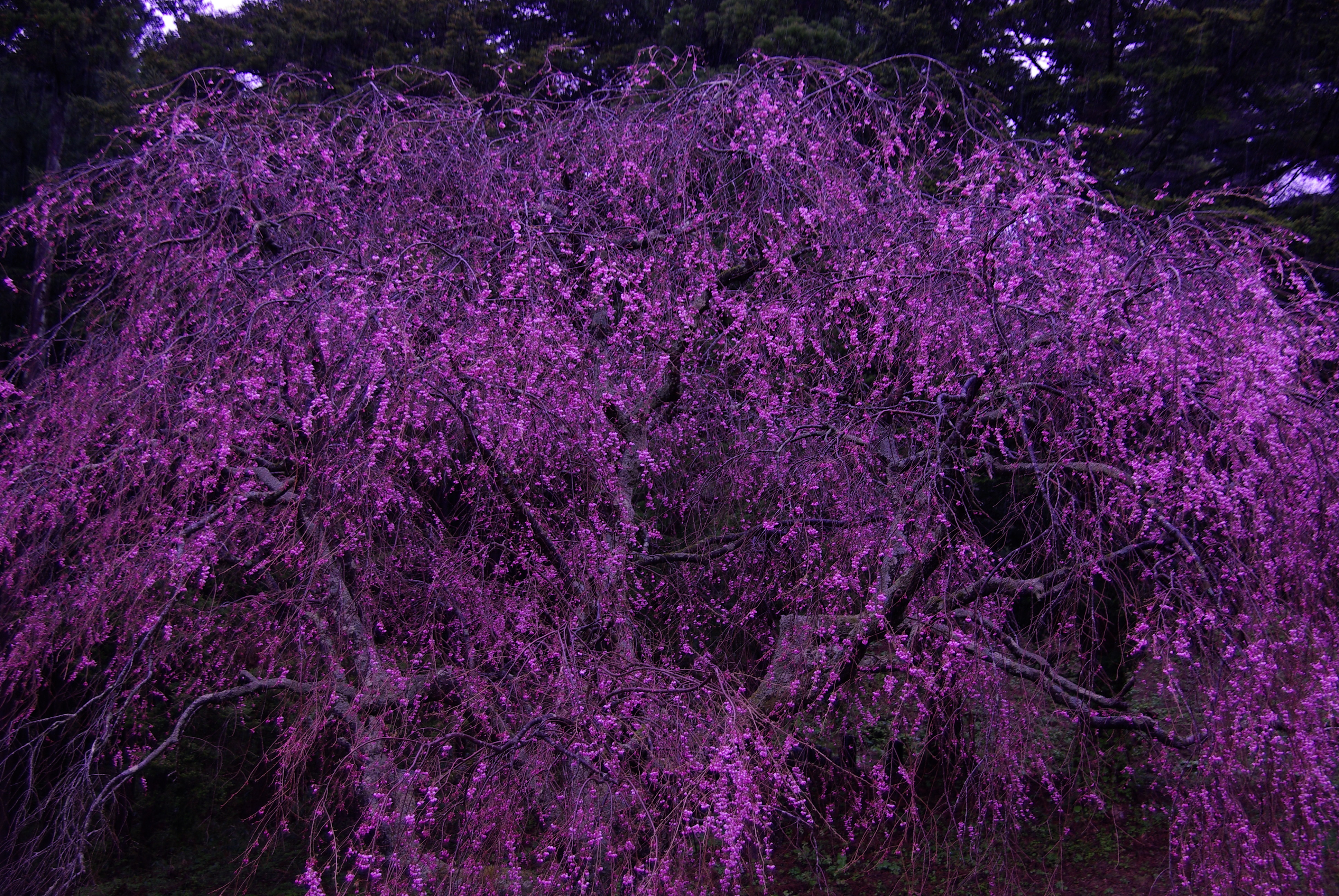 多宝院の枝垂れ桜